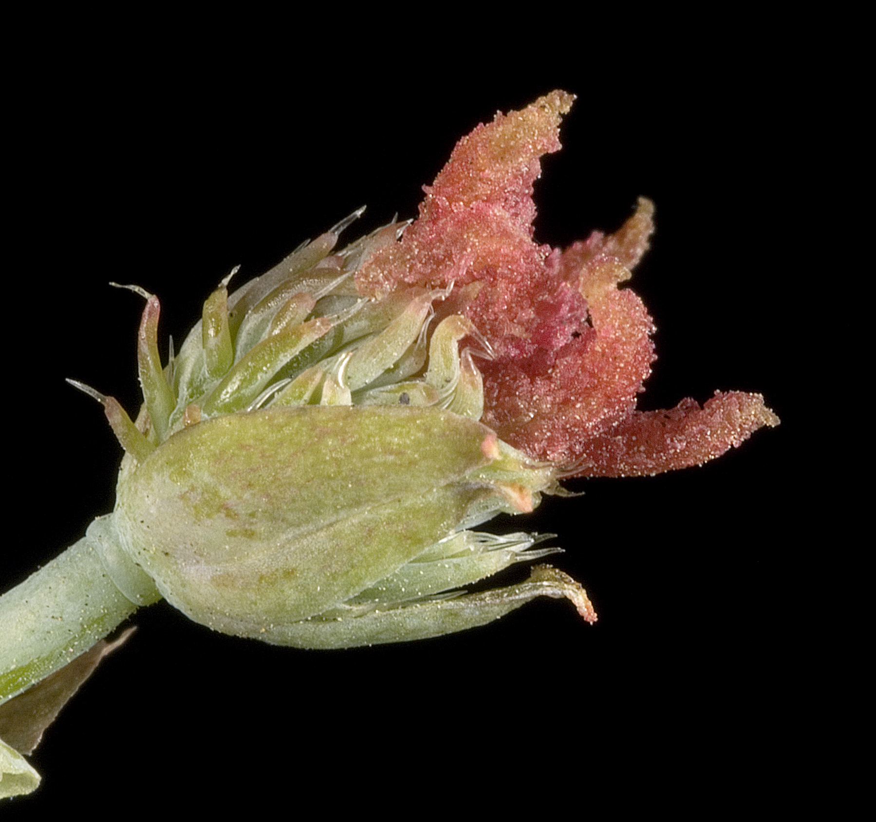 KRT3205